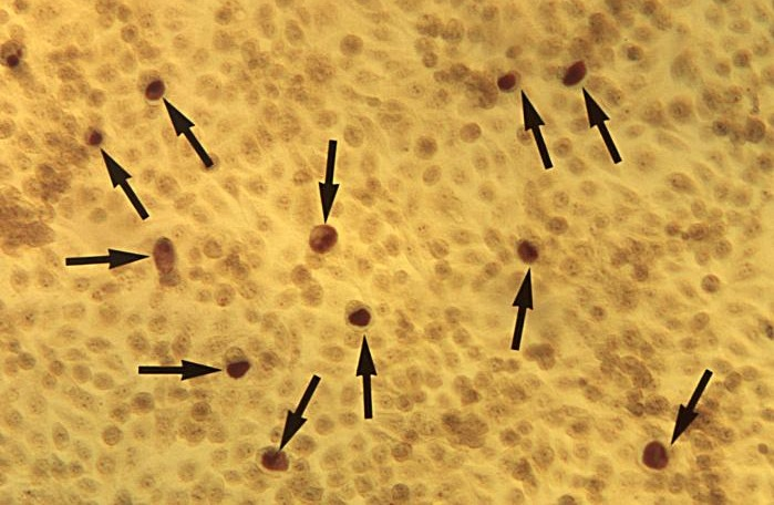 Окрашенные по Романовскому - Гимзе мазки показывает наличие цитоплазматических телец и включении хламидий.